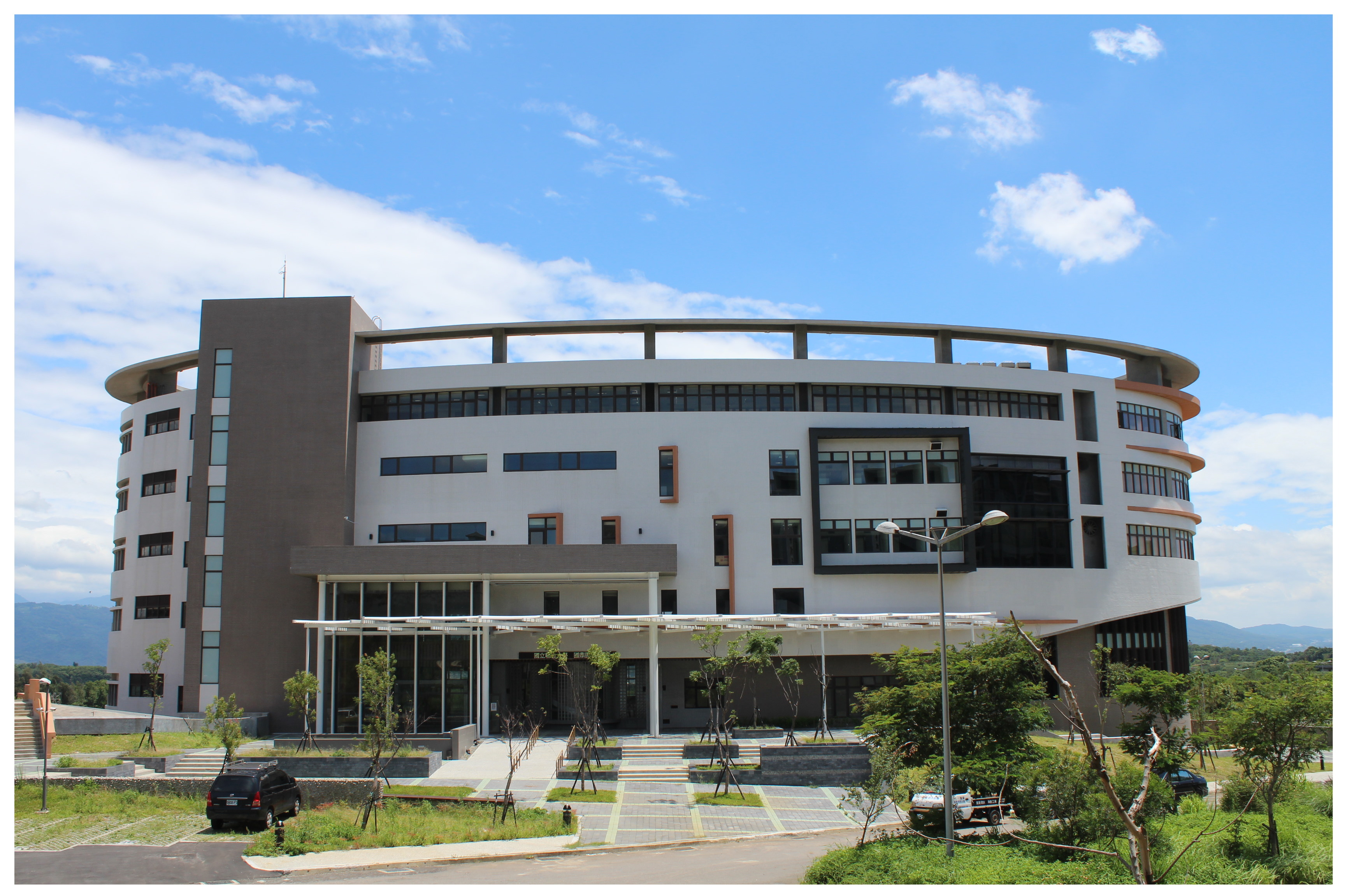 國立聯合大學國鼎圖書館